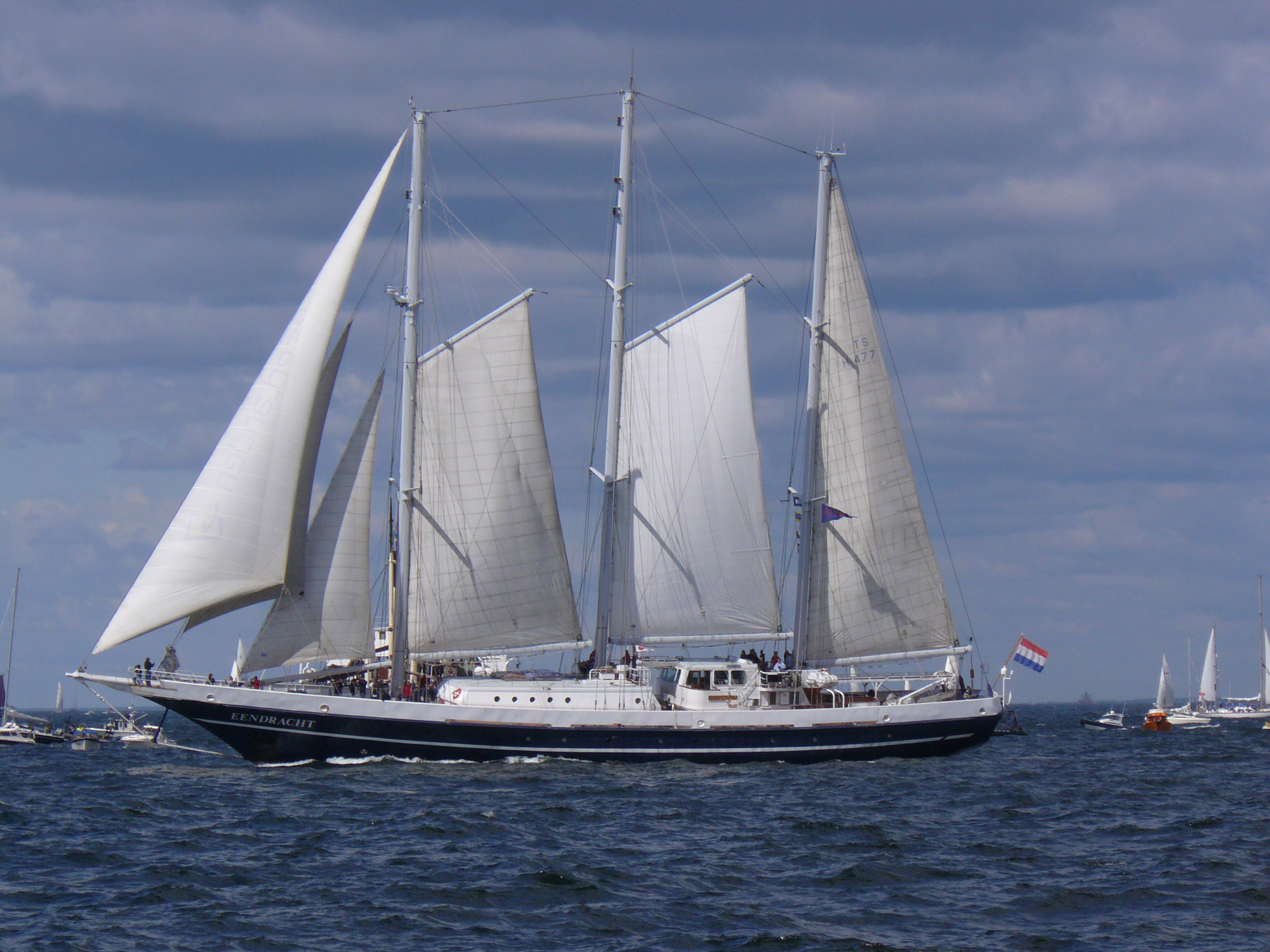 Eendracht II